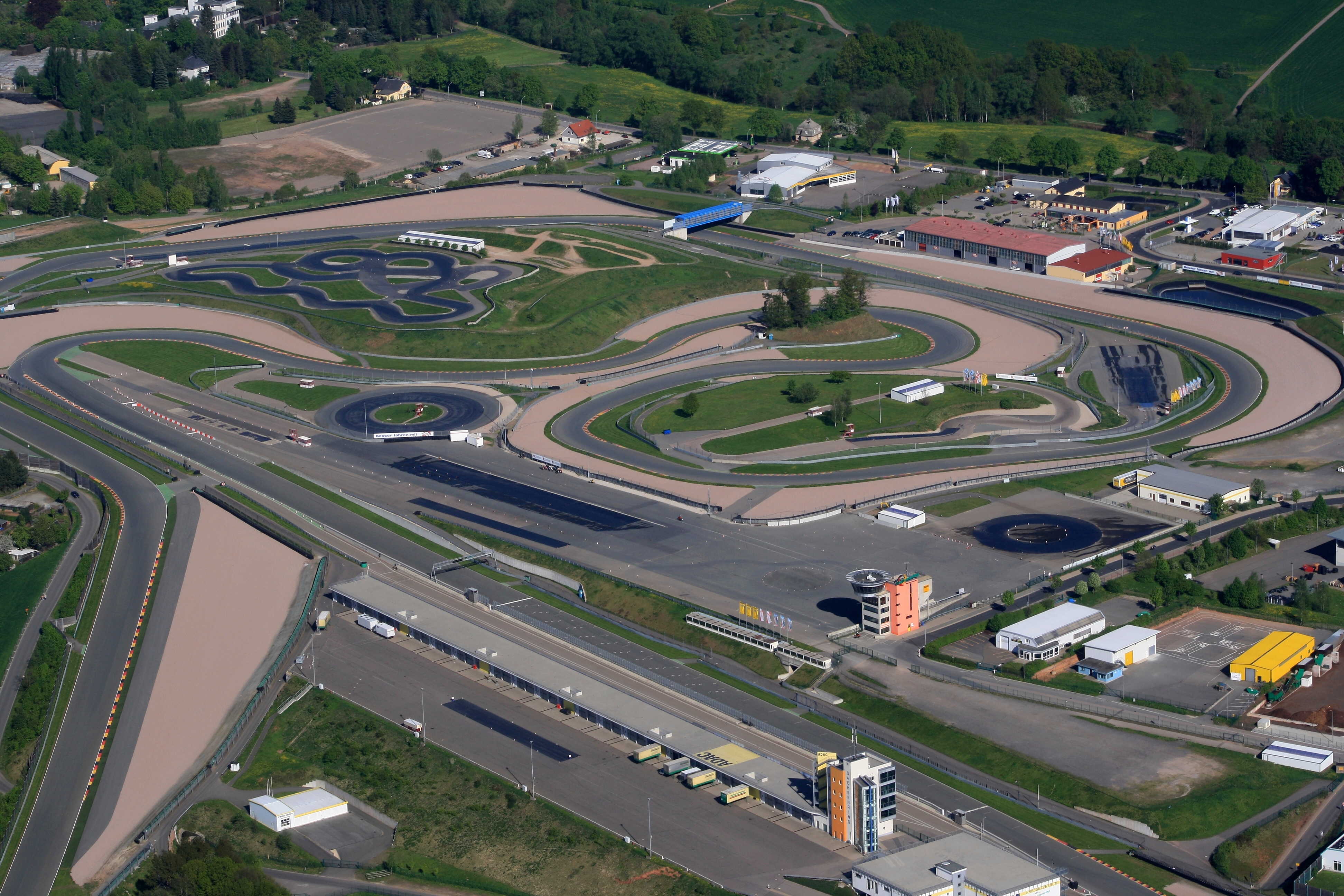 Sachsenring. Hohenstein-Ernsthal. Deutschland.